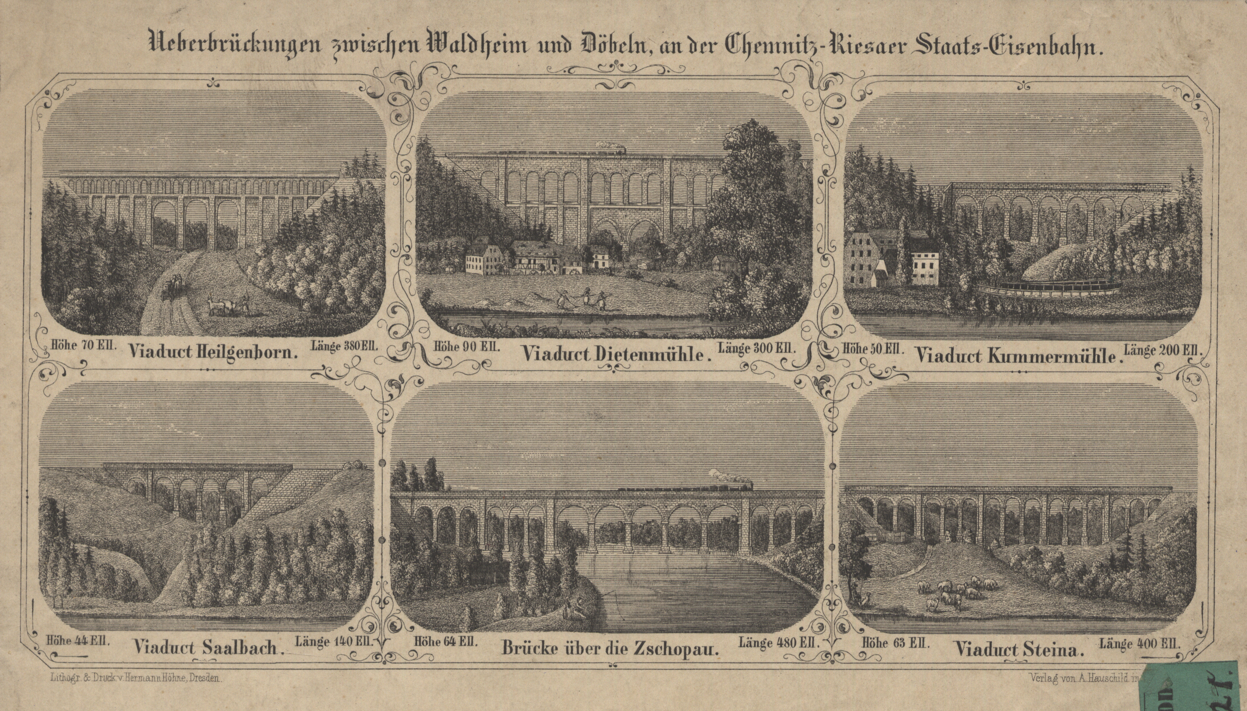 Ueberbrückungen zwischen Waldheim und Döbeln, an der Chemnitz-Riesaer Staats-Eisenbahn.